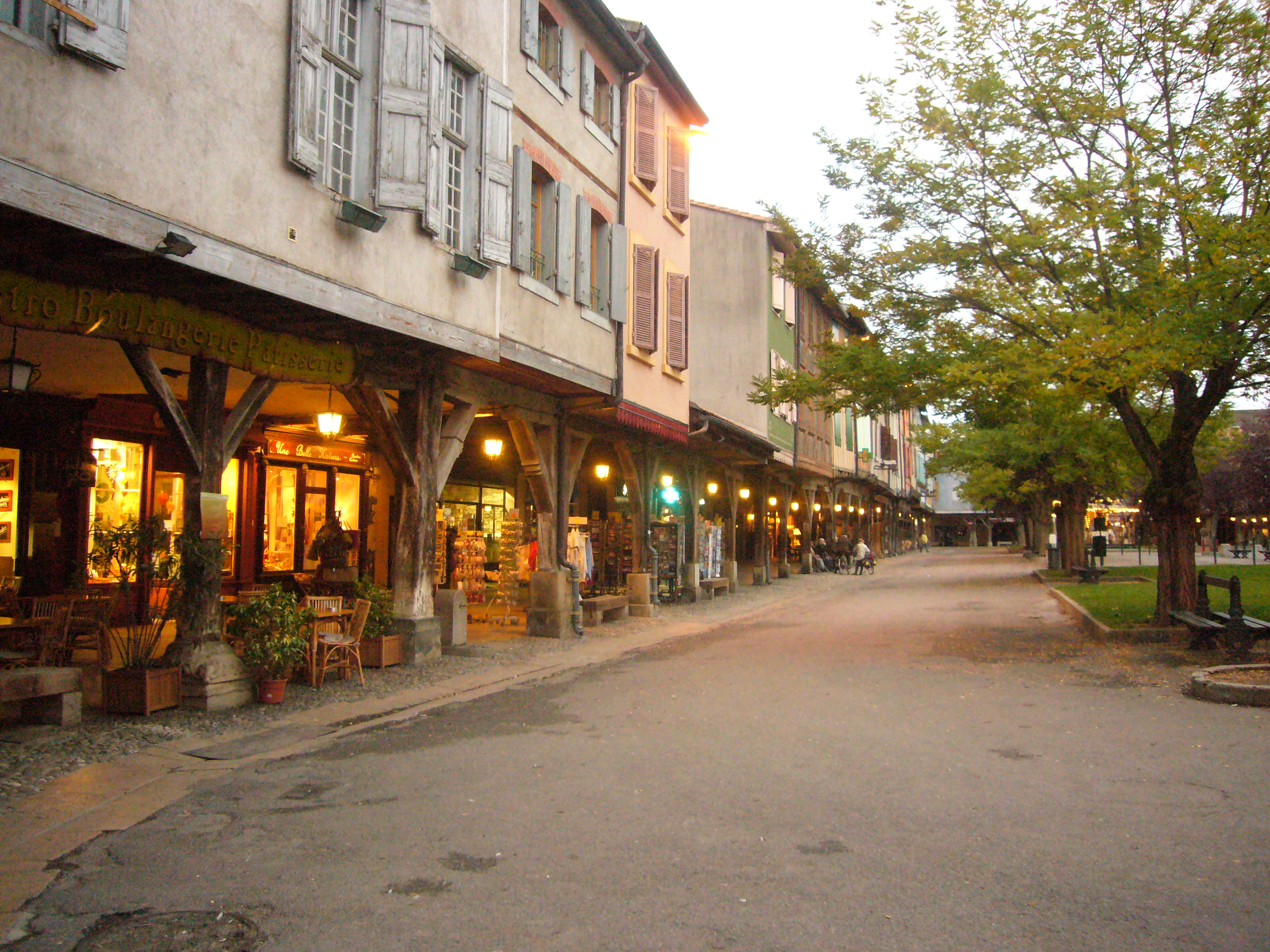 Place des Couverts à Mirepoix (Ariège, France)